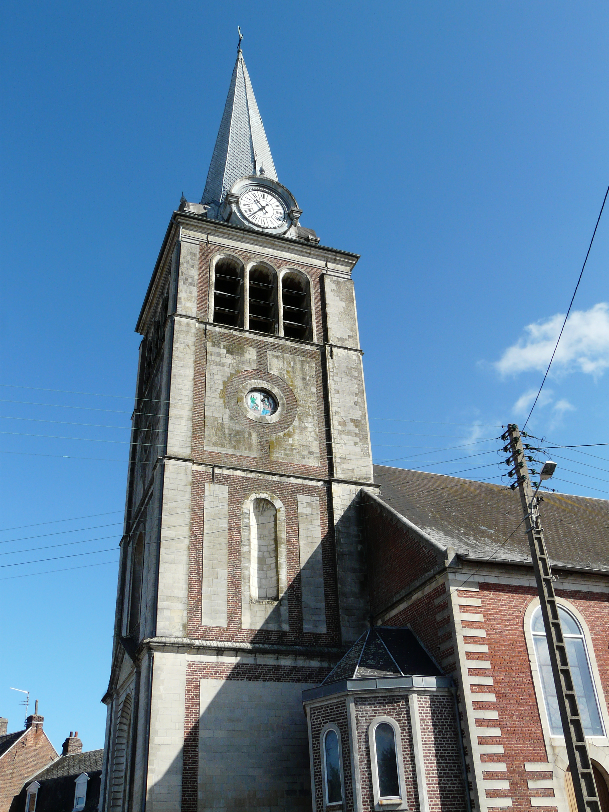 Le clocher de l'église d'Iwuy (Nord)